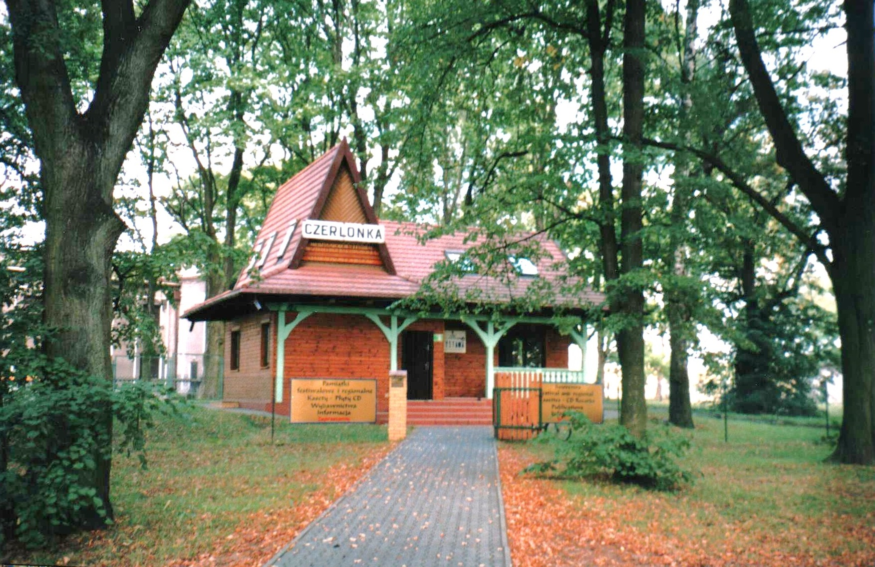 Budynek dawnego przystanku kolejowego Czerlonka, obecnie siedziba Biura Organizacyjnego Międzynarodowego Festiwalu Muzyki Cerkiewnej "Hajnówka" , a także Centrum Promocji Regionu "Czerlonka" w Hajnówce.